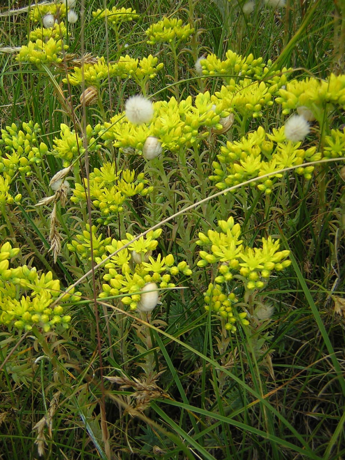 Sedum rupestre Hauteville, Manche, France Source : [1]